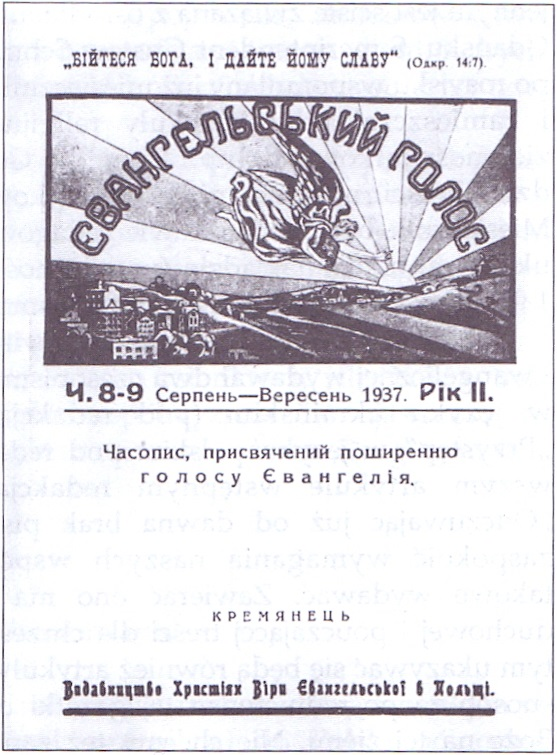 okładka czasopisma